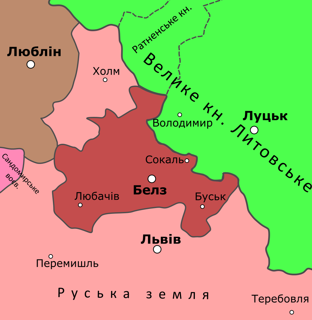 Белзьке князівство на початку XV ст.